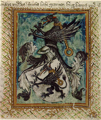 Beschreibung: Wappen der Familie von Watt von 1430